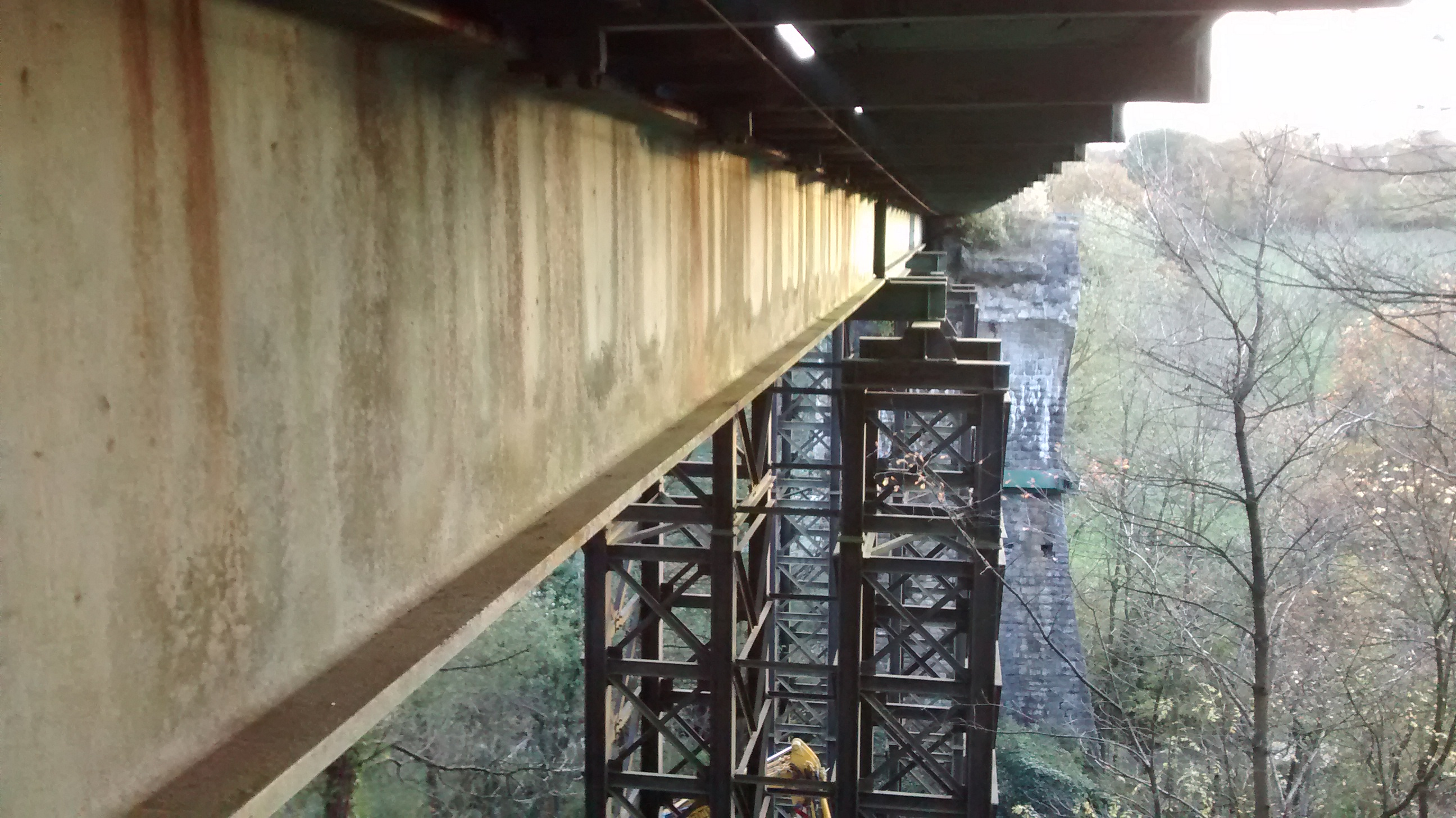 Durch amerikanische Pioniere wiederhergestellter Teil des Falkenbachviadukts. Der Fotostandort ist nicht öffentlich zugänglich; die Genehmigung zum Betreten des Geländes lag vor.